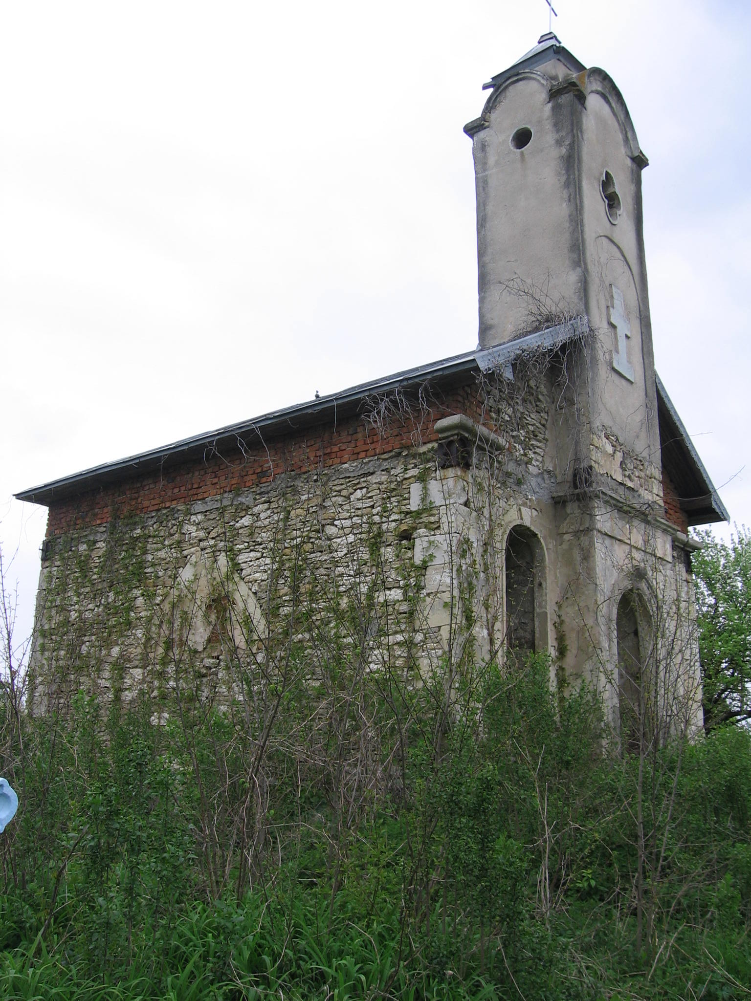 Усипальниця Ценських у Вікні на Покутті. Загальний вигляд.